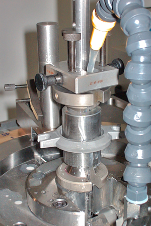 Nutenziehmaschine in Aktion